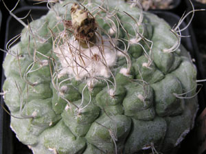 Turbinicarpus hoferi aus der Sammlung von „Andreae Kakteenkulturen“, Inh. Michael Januschkowetz, Ausserhalb Lengfeld 17, 64853 Otzberg-Lengfeld